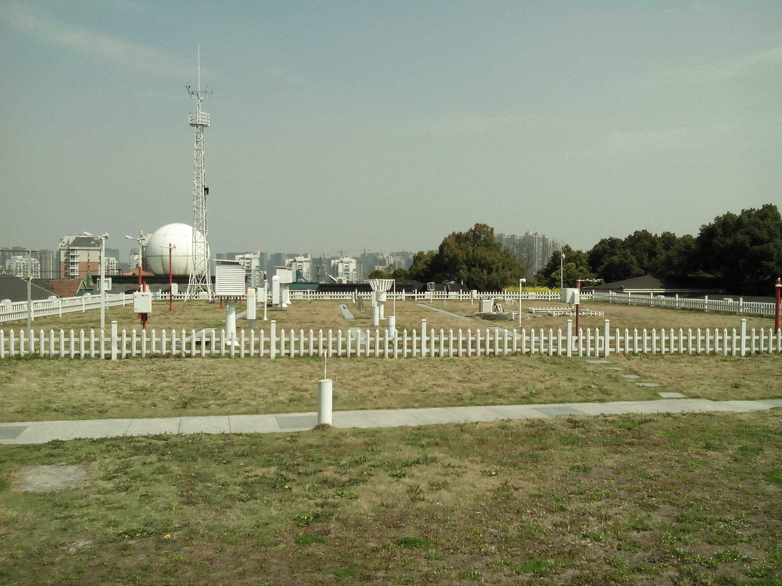 杭州国家基准气候站